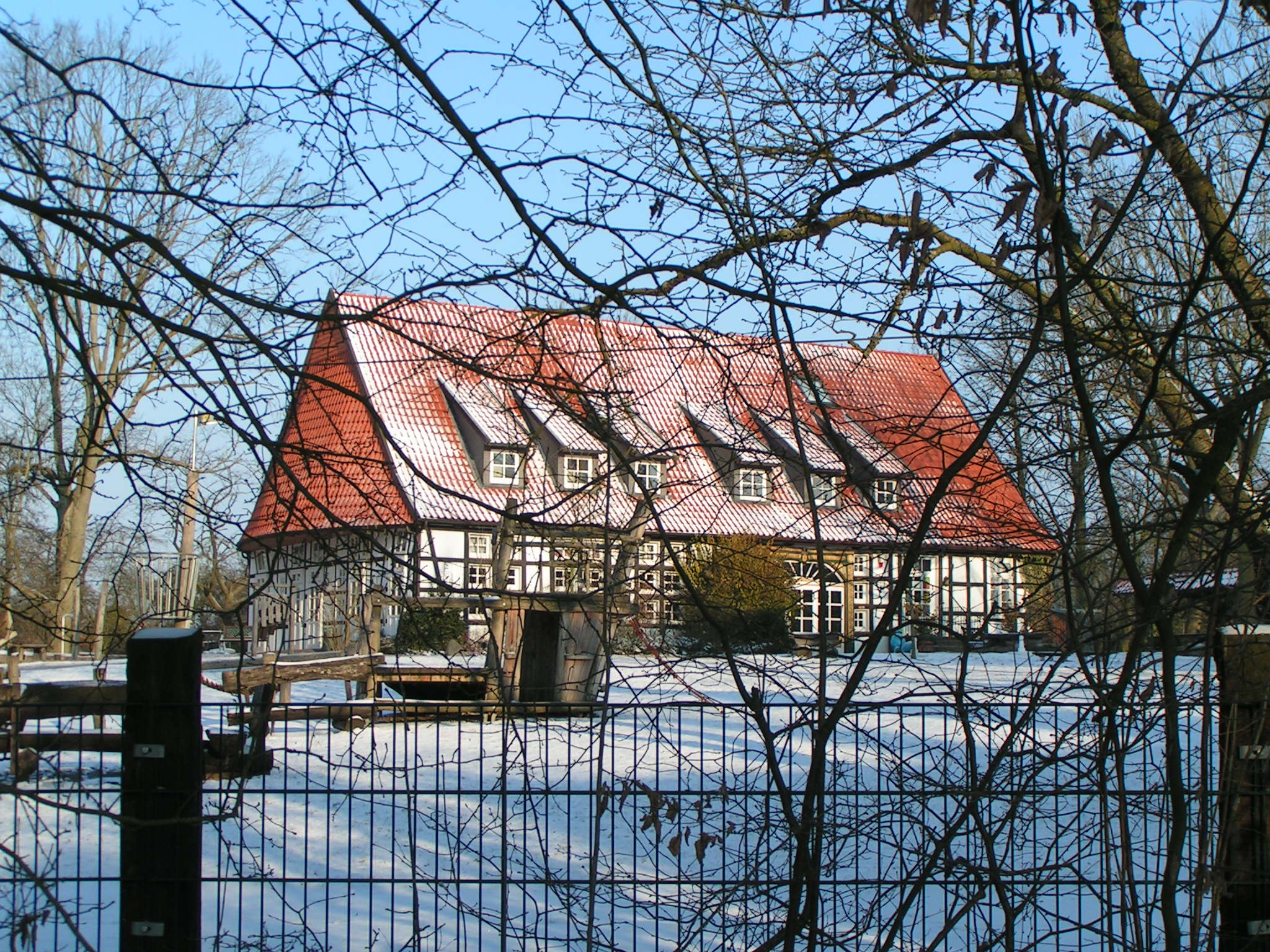 Oexer Hof im Komplex der Kurklinik Bad Oexen